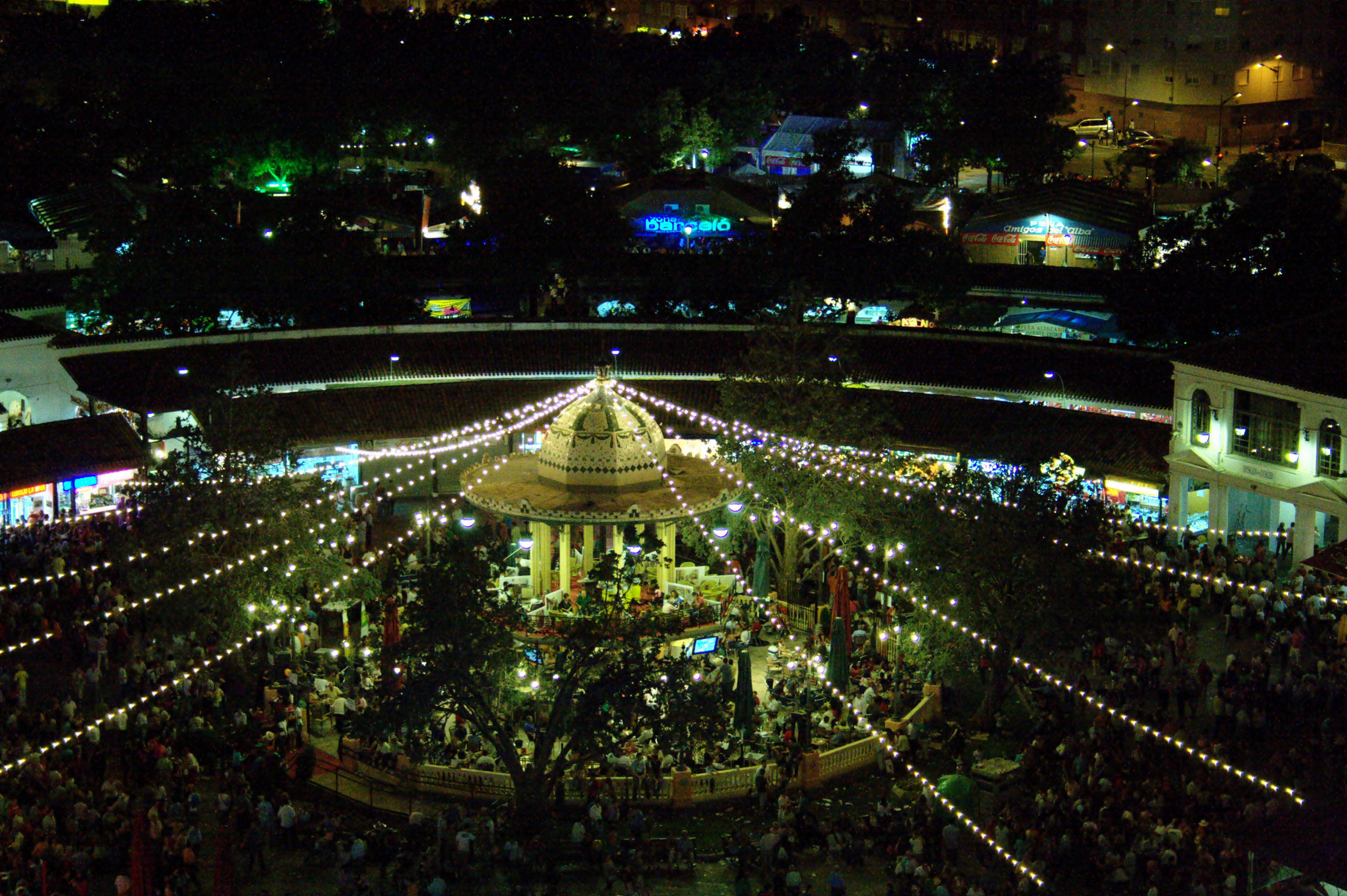 Feria de Albacete 2007_06